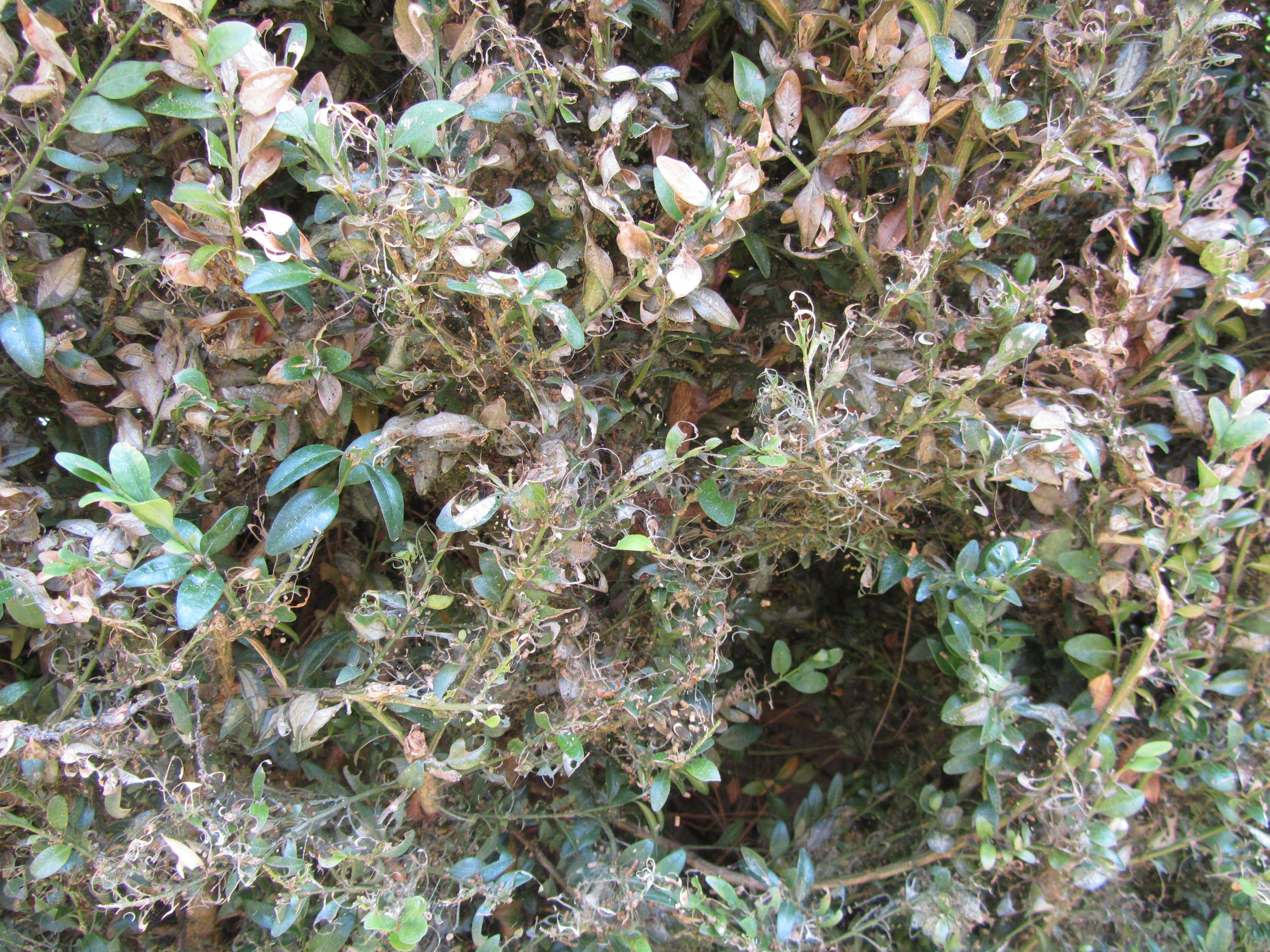 Fraßbild des Buchsbaumzünslers Cydalima perspectalis (caterpillar)an einem Buchsbaum (Buxus sempervirens)